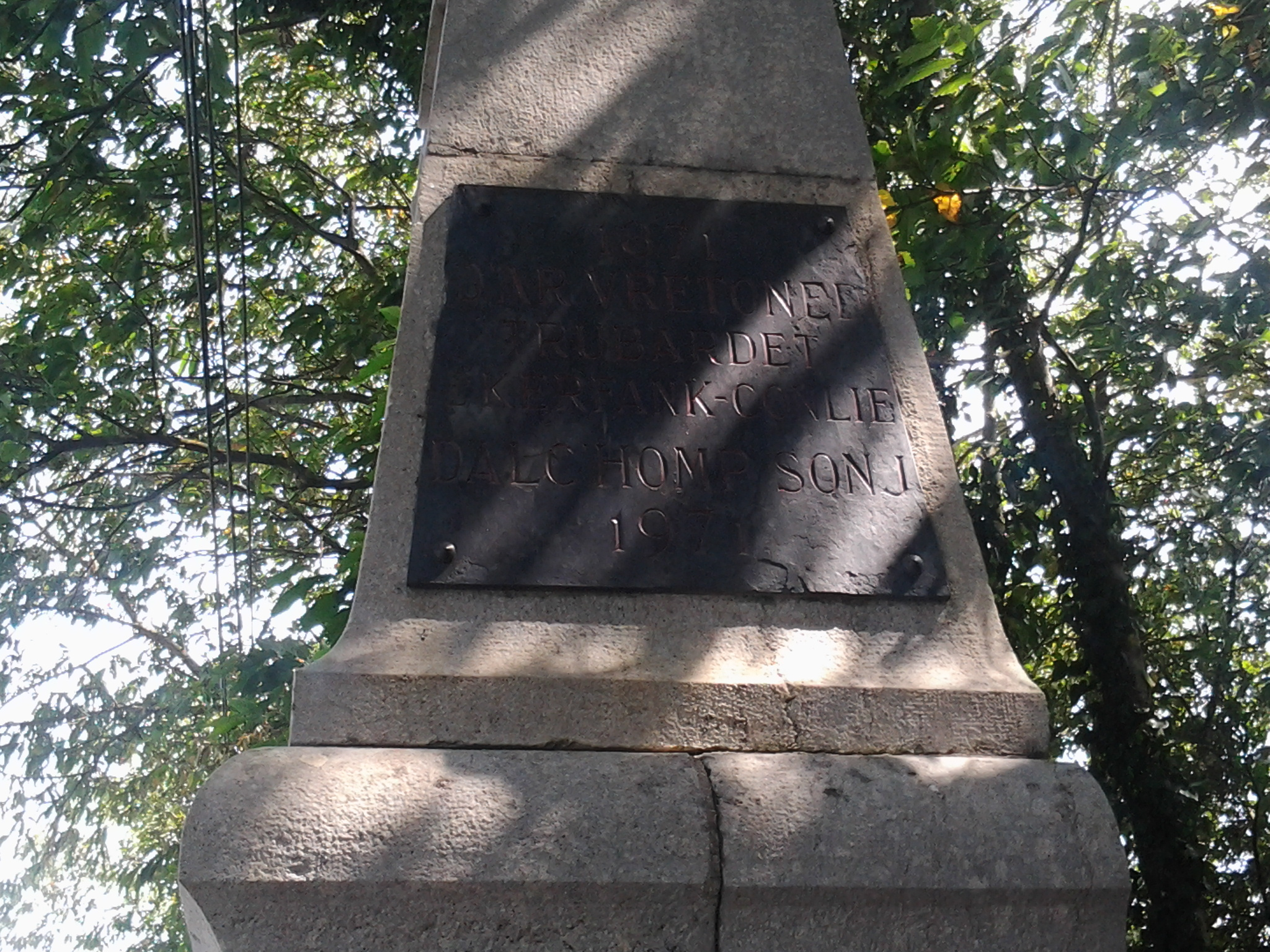 Plaque commémorative déposée en 1971. Sur cette plaque, est écrit en breton : 1871 D'AR VRETONED TRUBARDET E KERFANK-CONLIE DALC'HOMP SONJ 1971